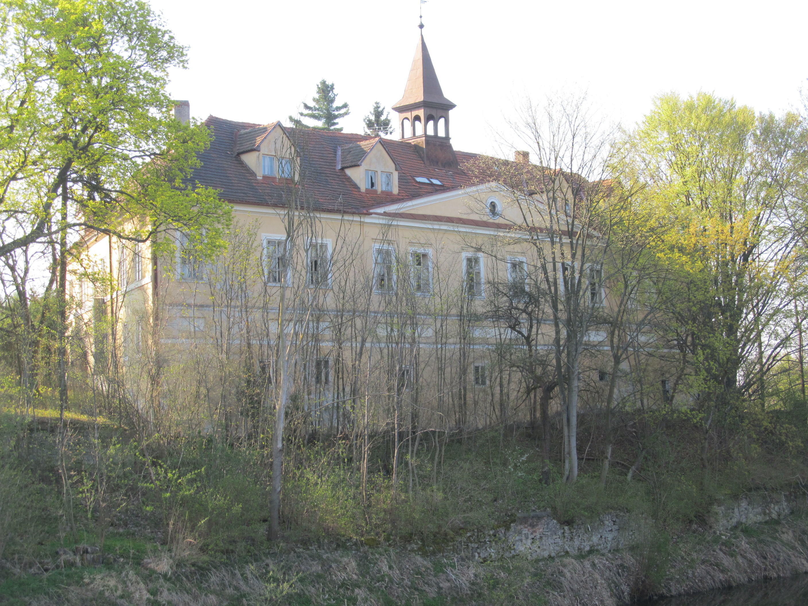 Defurovy Lažany - zámek